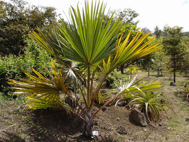 Description: Latania lontaroides, novembre 2004, Conservatoire botanique de Mascarin, La Réunion Source: Bouba